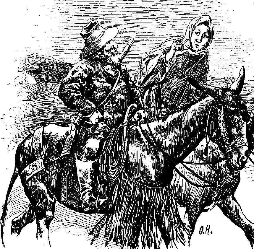 Sam_Hawkens auf seinem Maultier Mary sowie Kantor Matthäus Aurelius Hampel. Illustration des Romans Der Ölprinz von Karl May, erschienen in der Zeitschrift Der Gute Kamerad im Verlag Wilhelm Spemann